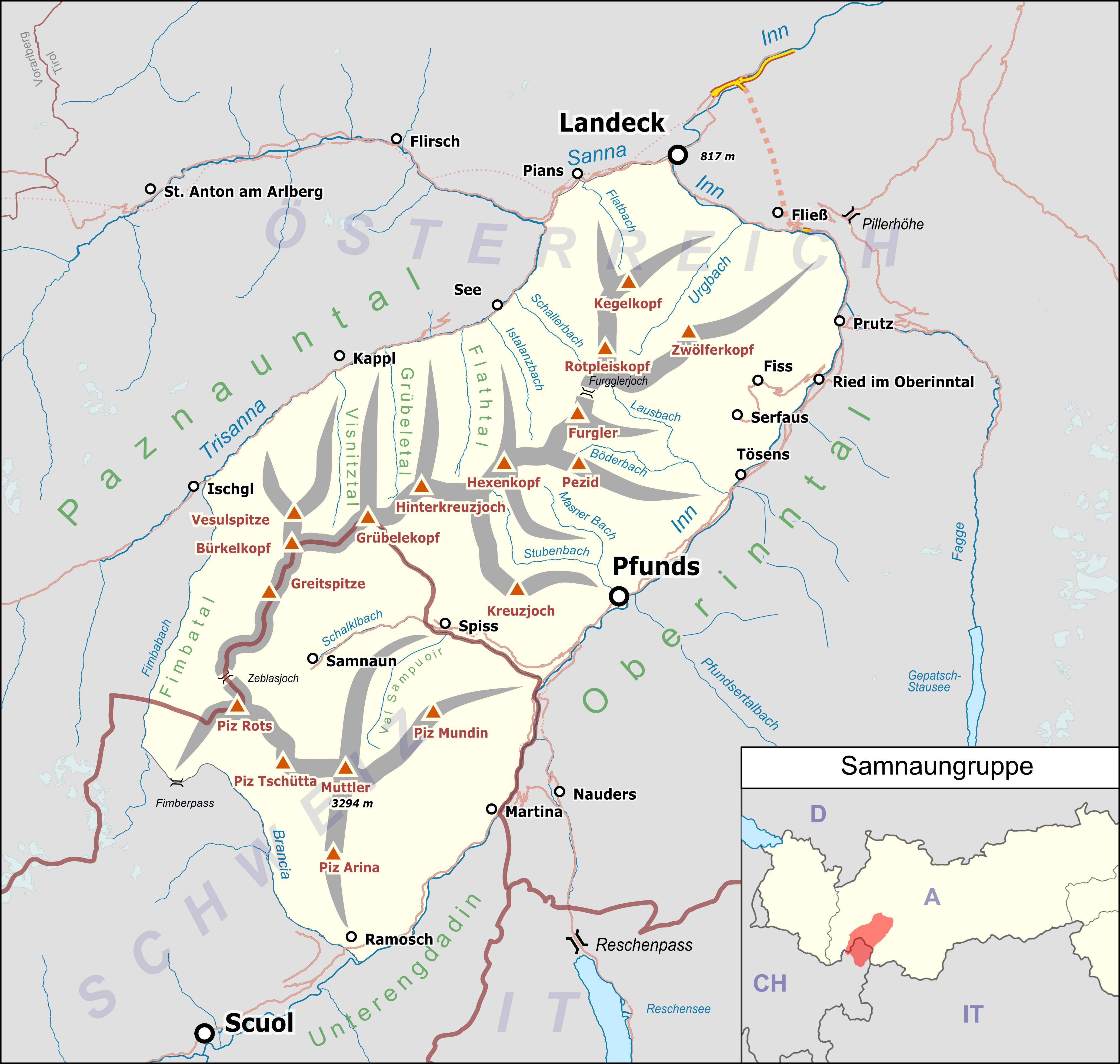 Lagekarte der Samnaungruppe